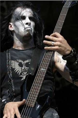 Tomasz Orion Wróblewski from Behemoth.